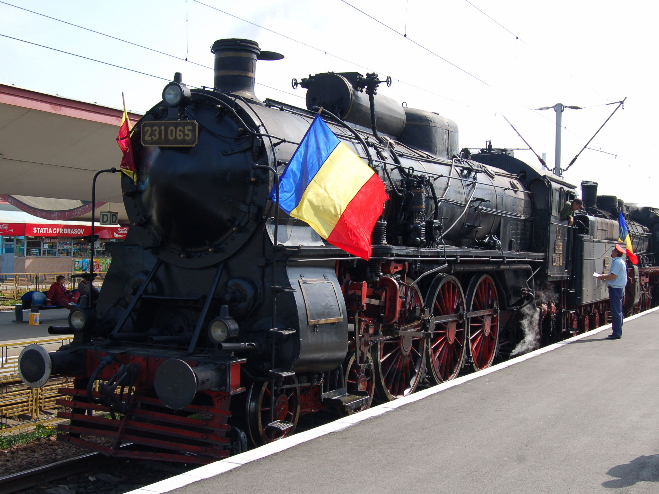 Locomotiva CFR 231.965